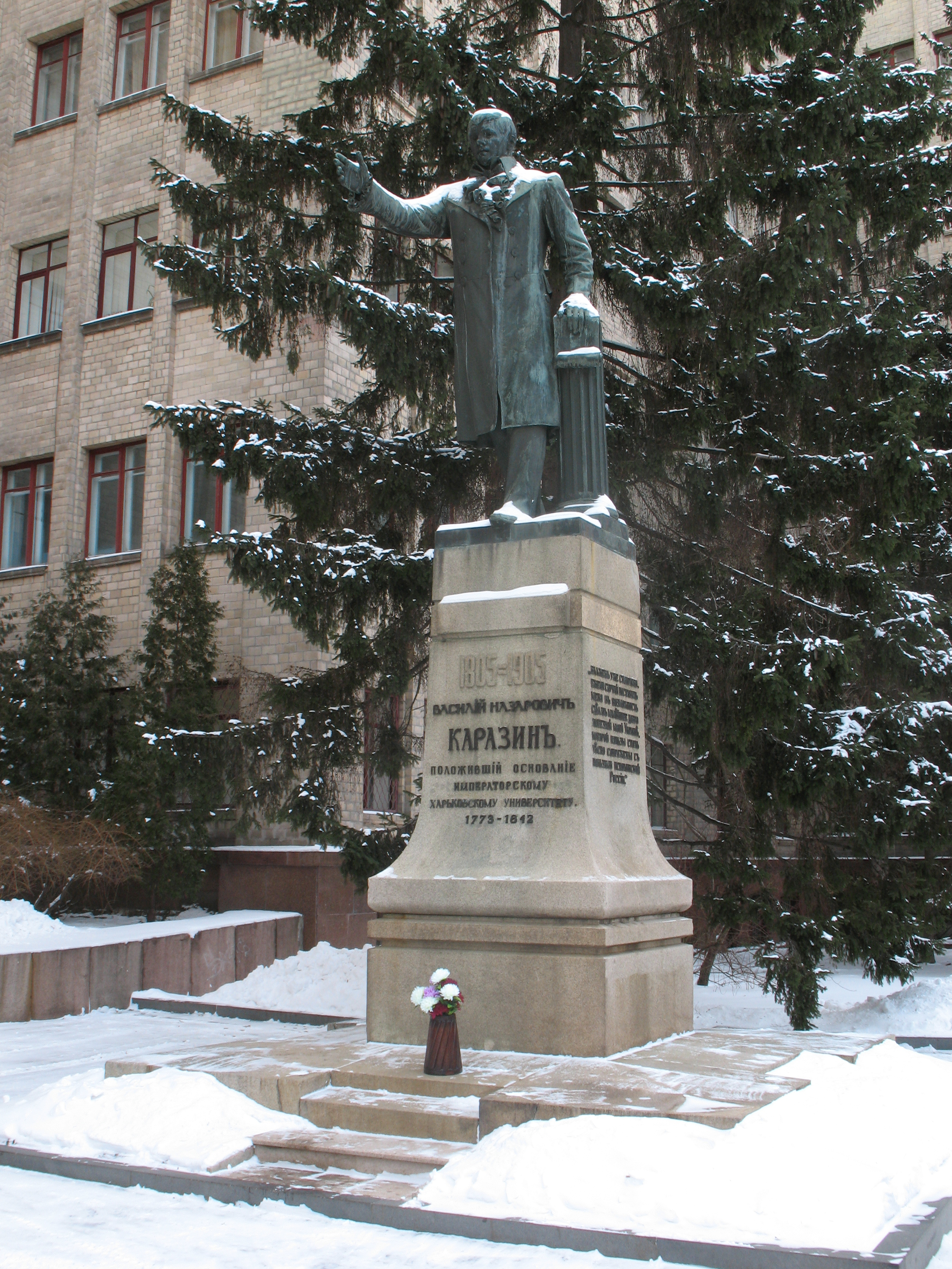 Karazin Monument in Kharkov.